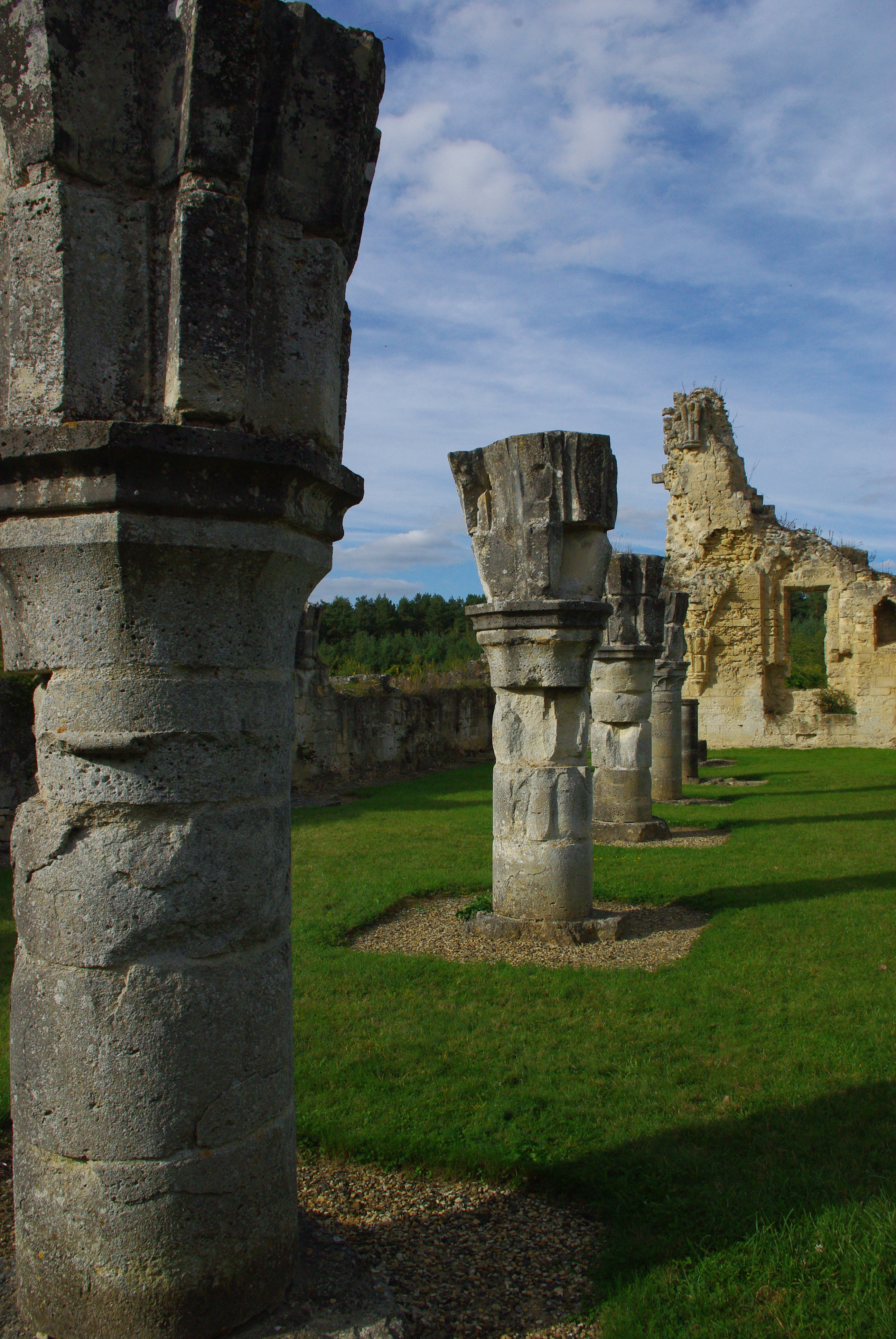 Colonnes du batiment des convers (XIIIe) .